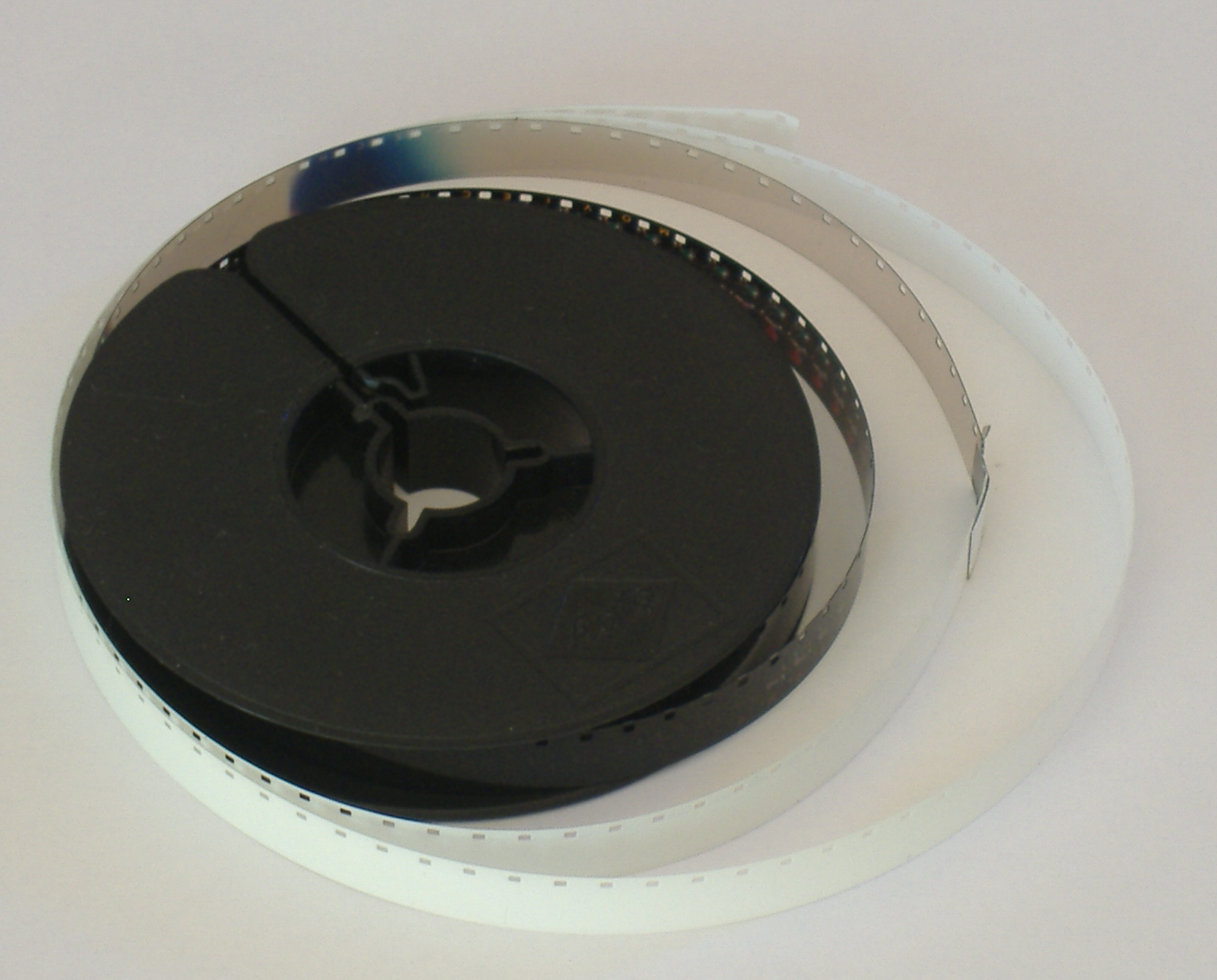 Bobina Super 8 Agfa desenrolla parcialmente